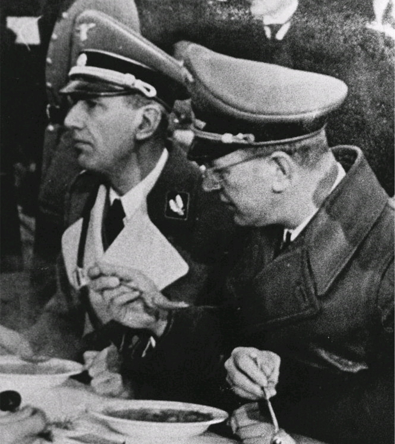 Dr. Hans Fischböck tijdens de oorlogsjaren in Nederland Generalkommissar für Finanz und Wirtschaft, samen met Dr. Arthur Seyss Inquart, rijkscommissaris voor de bezette Nederlandse gebieden. Fischbock trad in februari-maart 1938 samen met Seyss-Inquart naar voren als een der instrumenten van de Anschluss. Toen Seyss-Inquart in mei 1940 als rijkscommissaris naar Nederland kwam, werd Fischböck hier commissarris-generaal voor Financien en Economie. 14-01-1944